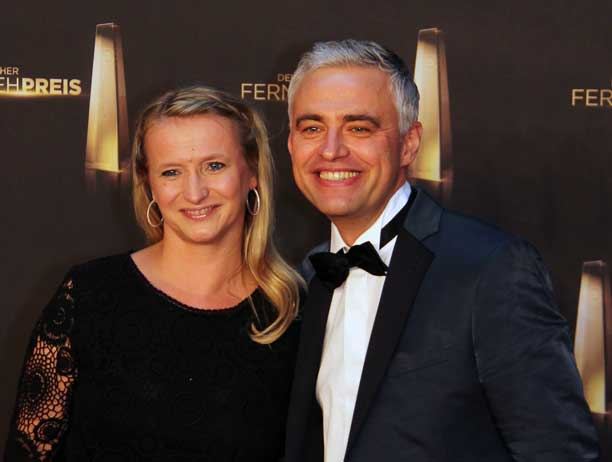 Andreas von Thien und Begleitung beim Deutschen Fernsehpreis 2012